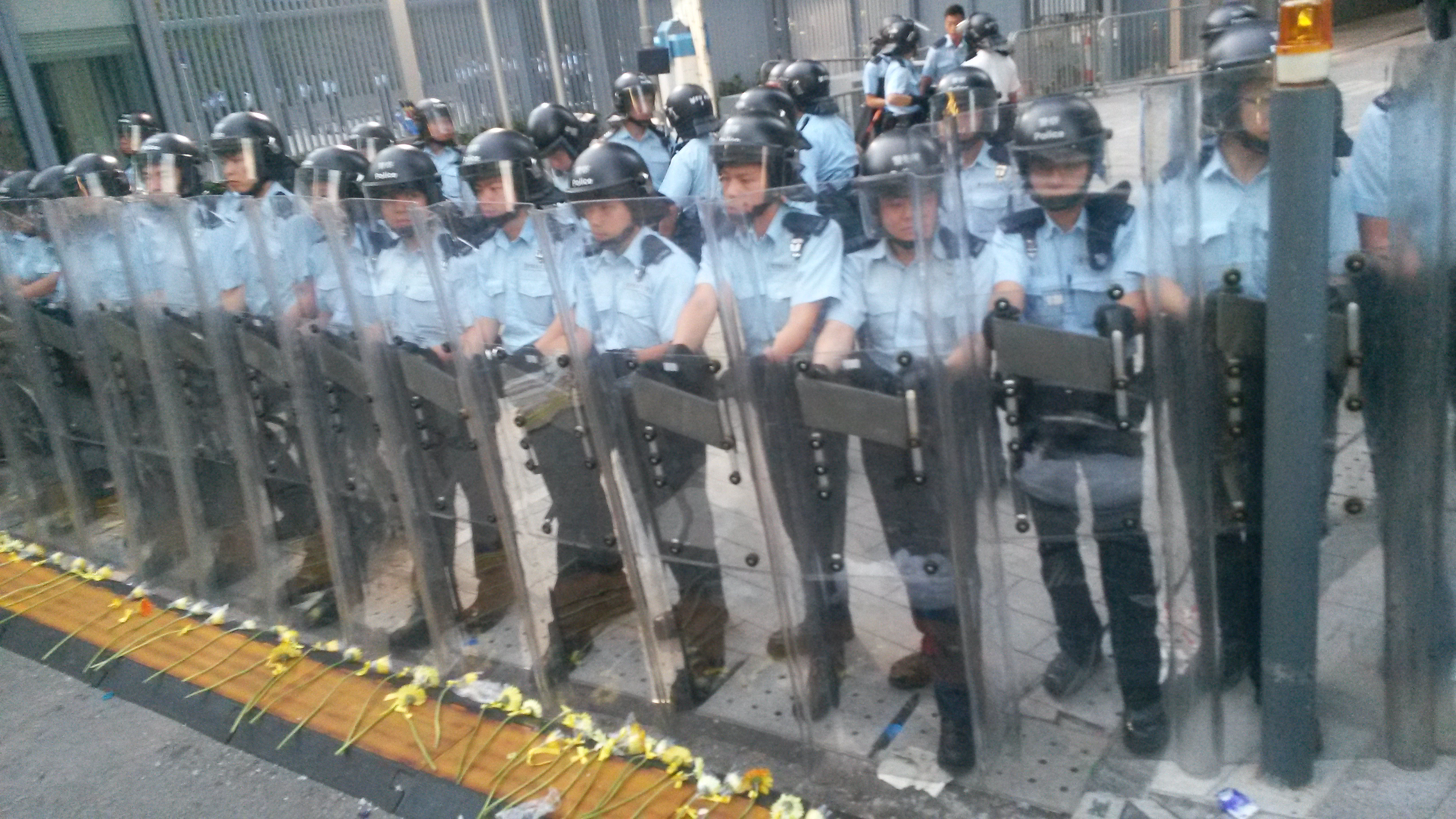 中文（香港）: 雨傘革命中警察佈防